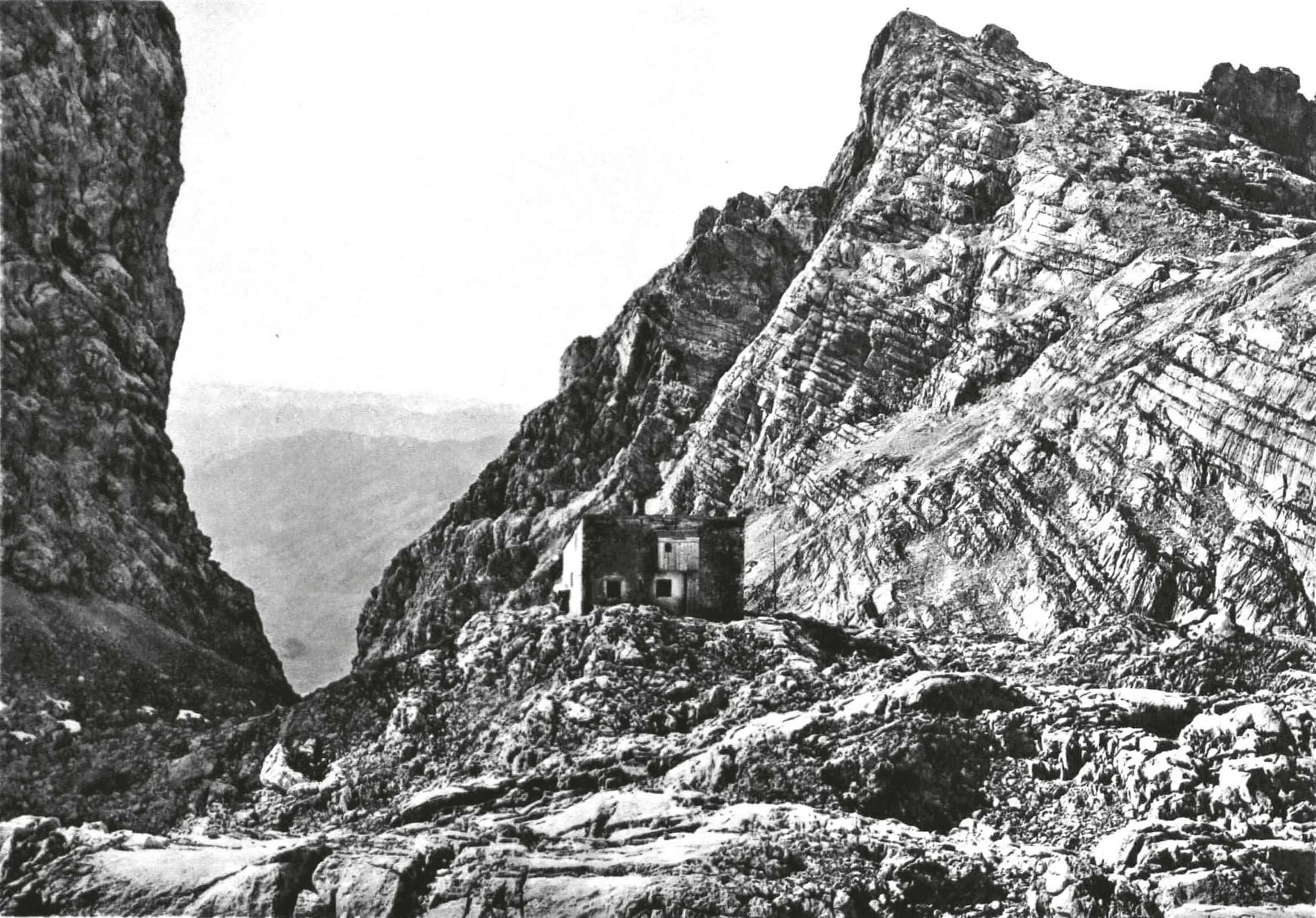 Riemann-Haus aus der Zeitschrift des Deutschen und Oesterreichischen Alpenvereins 1894 Band 25